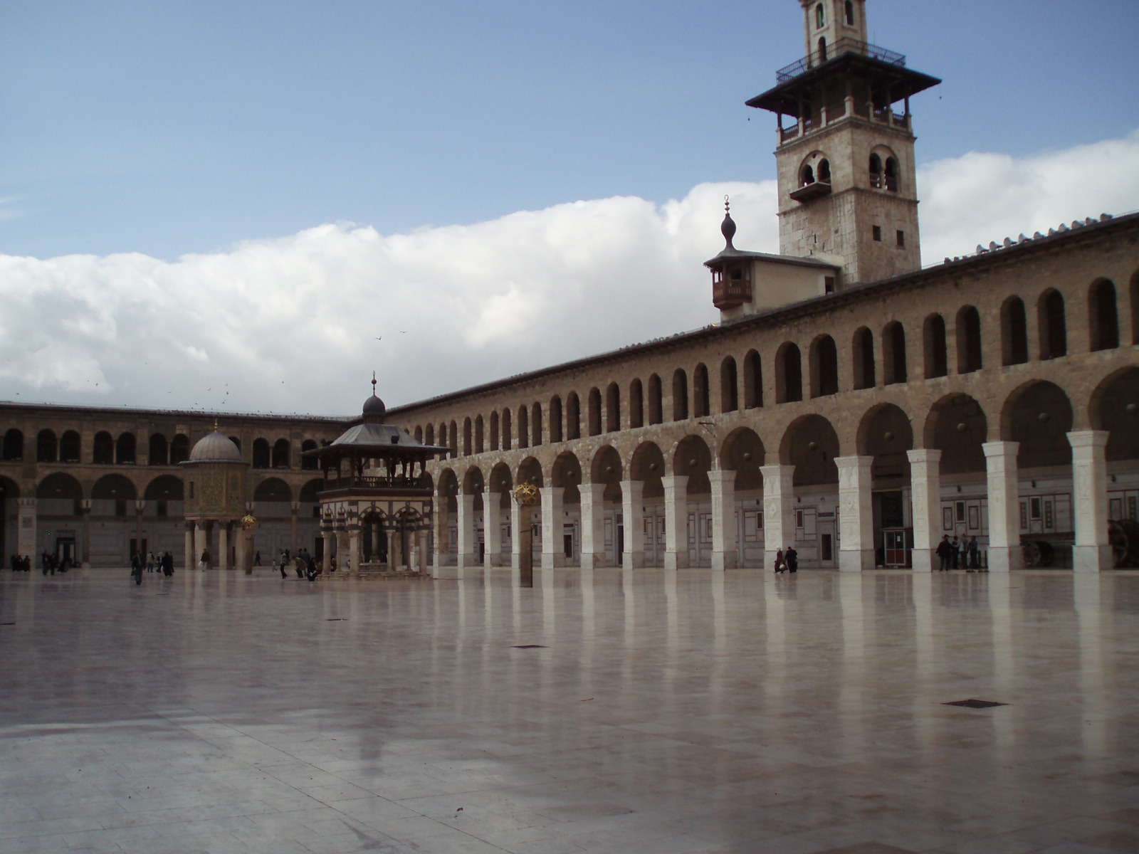 Ommayad Mosque